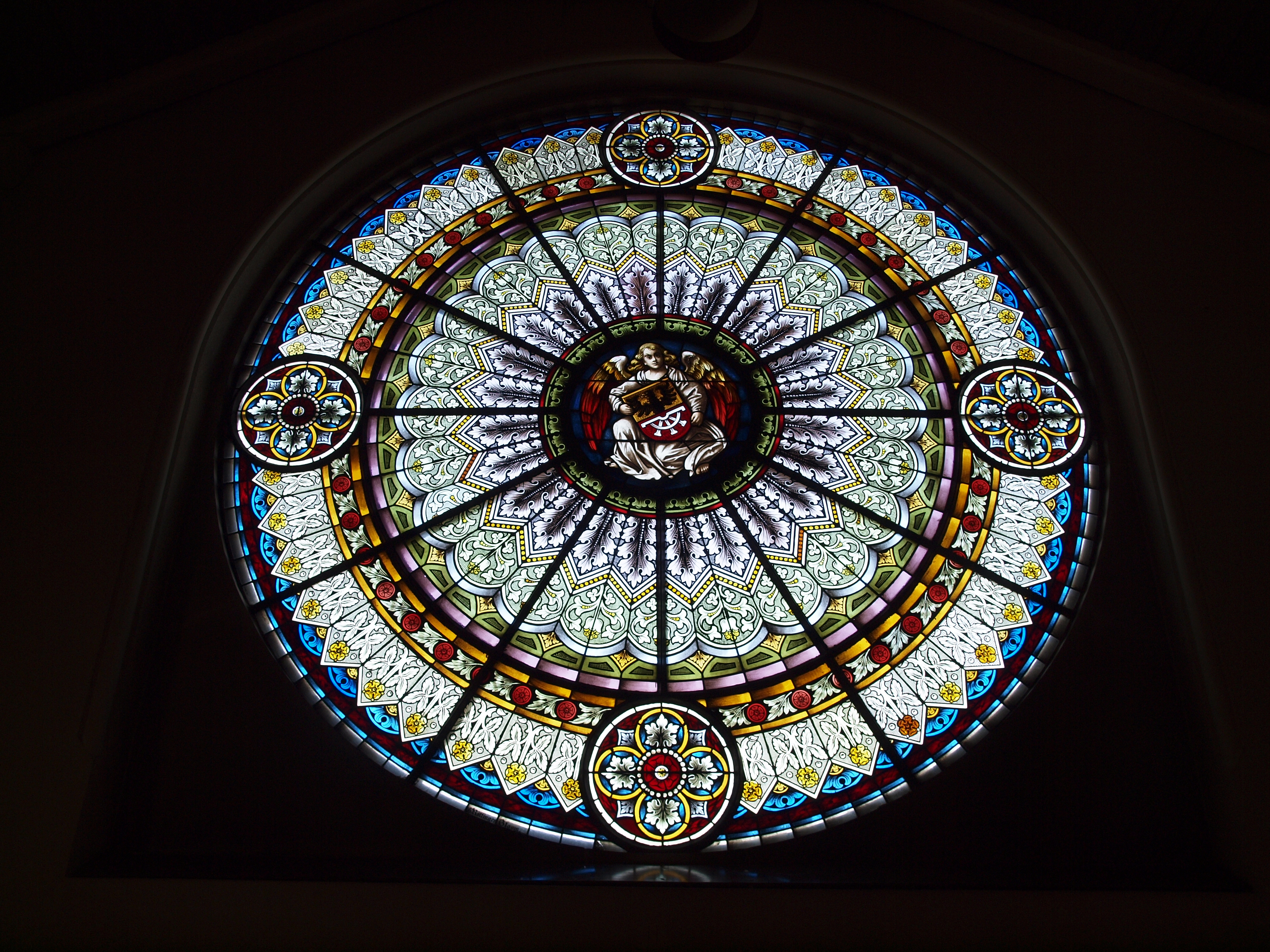 Rosettenfenster über dem Hauptportal der reformierten Kirche von Adliswil. Das Glasfenster ist von Jakob Georg Röttinger (1862-1913) hergestellt worden.